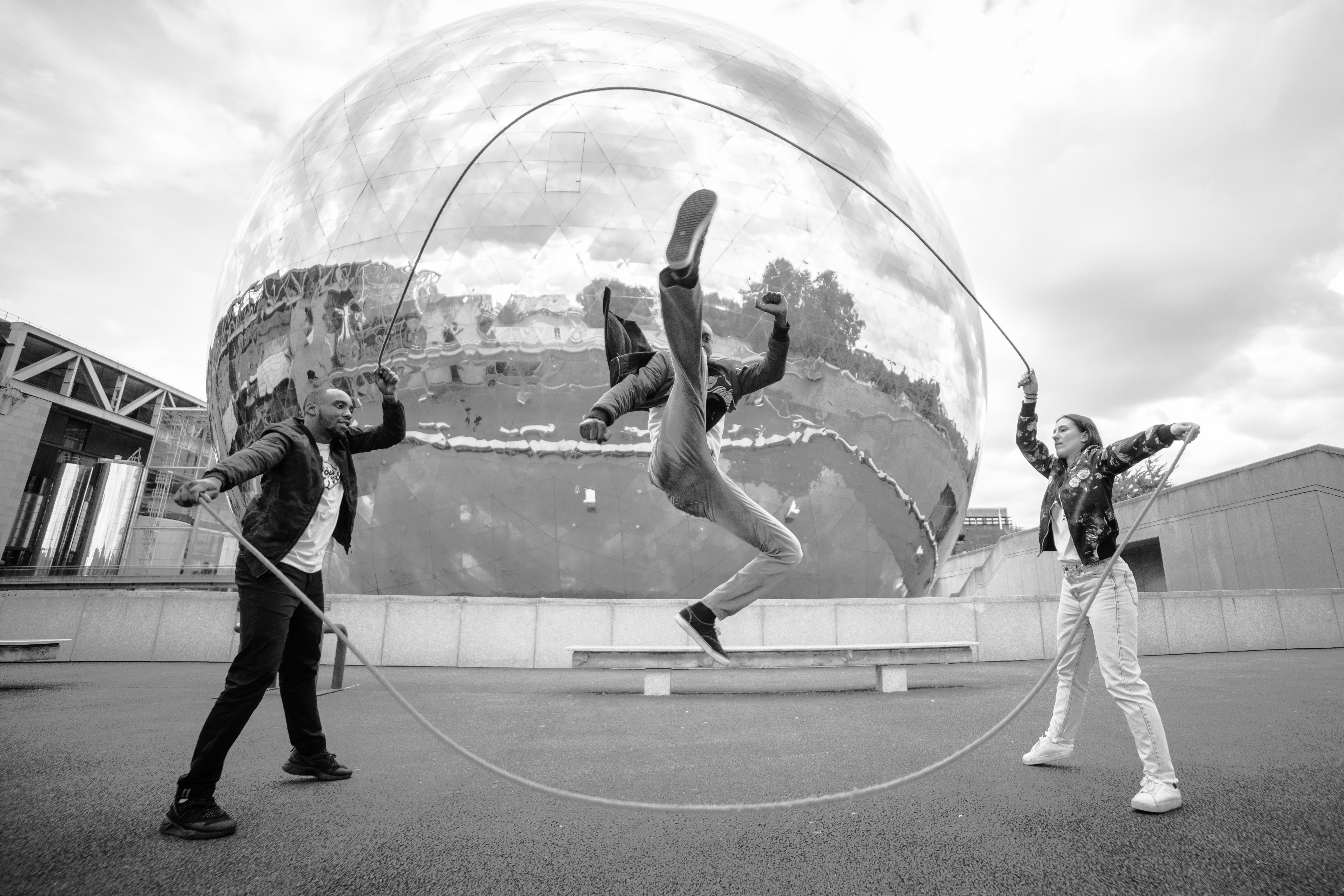 Photo de Double Dutch de The Ropestylers prise par le photographe Adrien Plaud